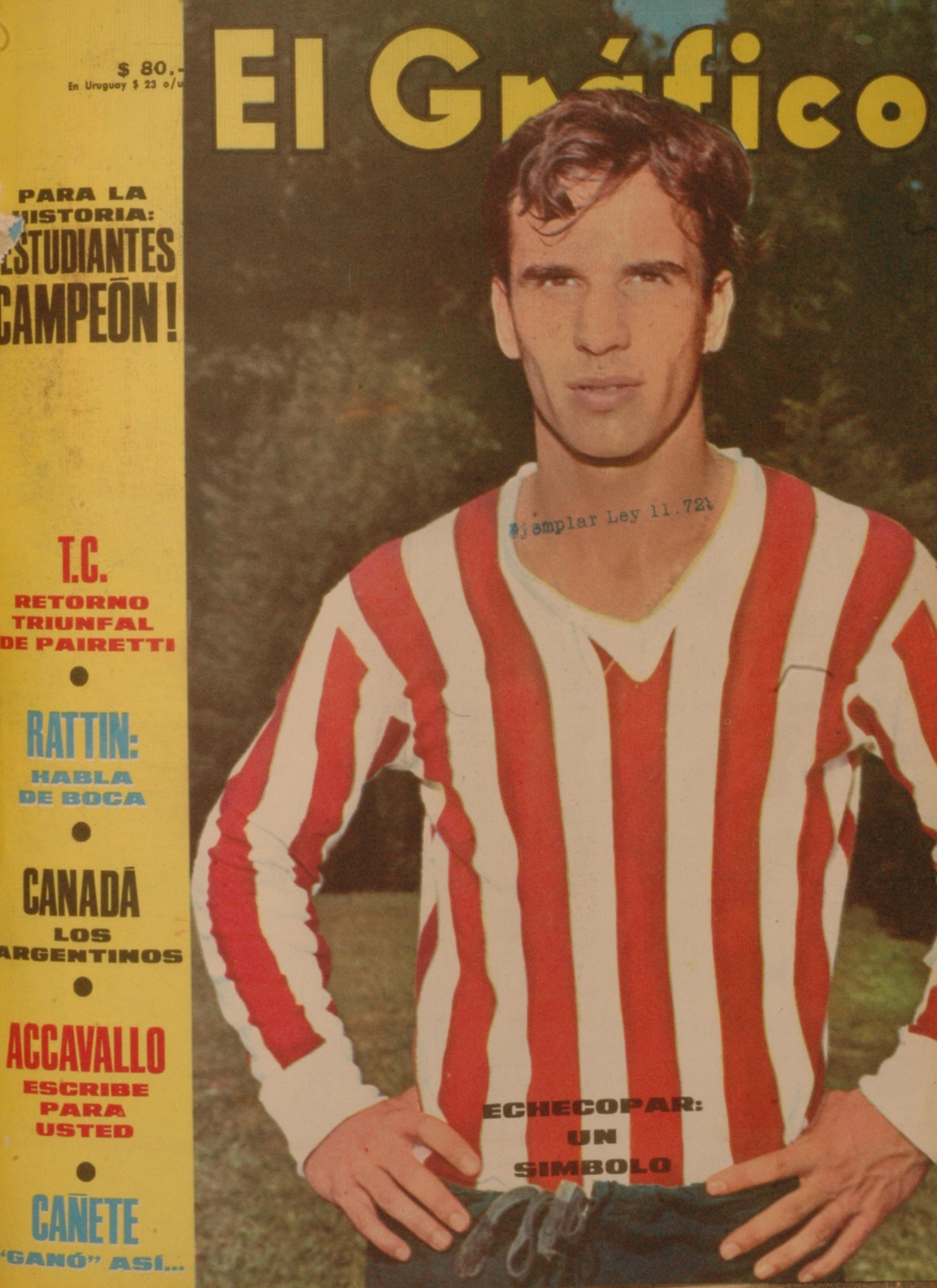 El Grafico del 08 de Agosto de 1967. Edicion 2496